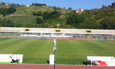 Il settore distinti dello stadio Guido Angelini di Chieti.jpg